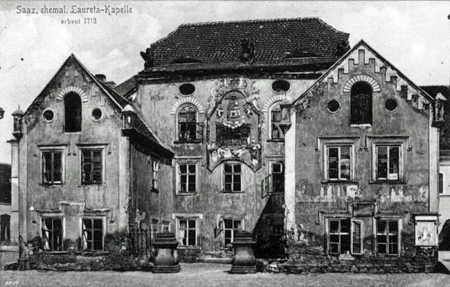 Ehem. Lorettokapelle auf dem Lorettoplatz in Saaz/Žatec (stand vor der heutigen Brauerei)